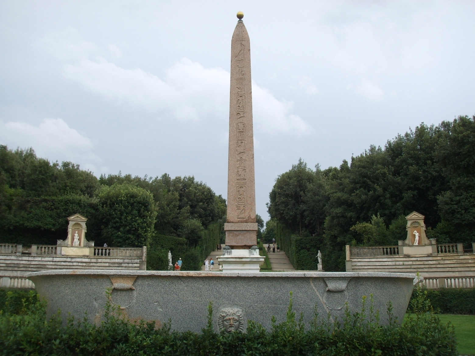 Boboli, obelisco